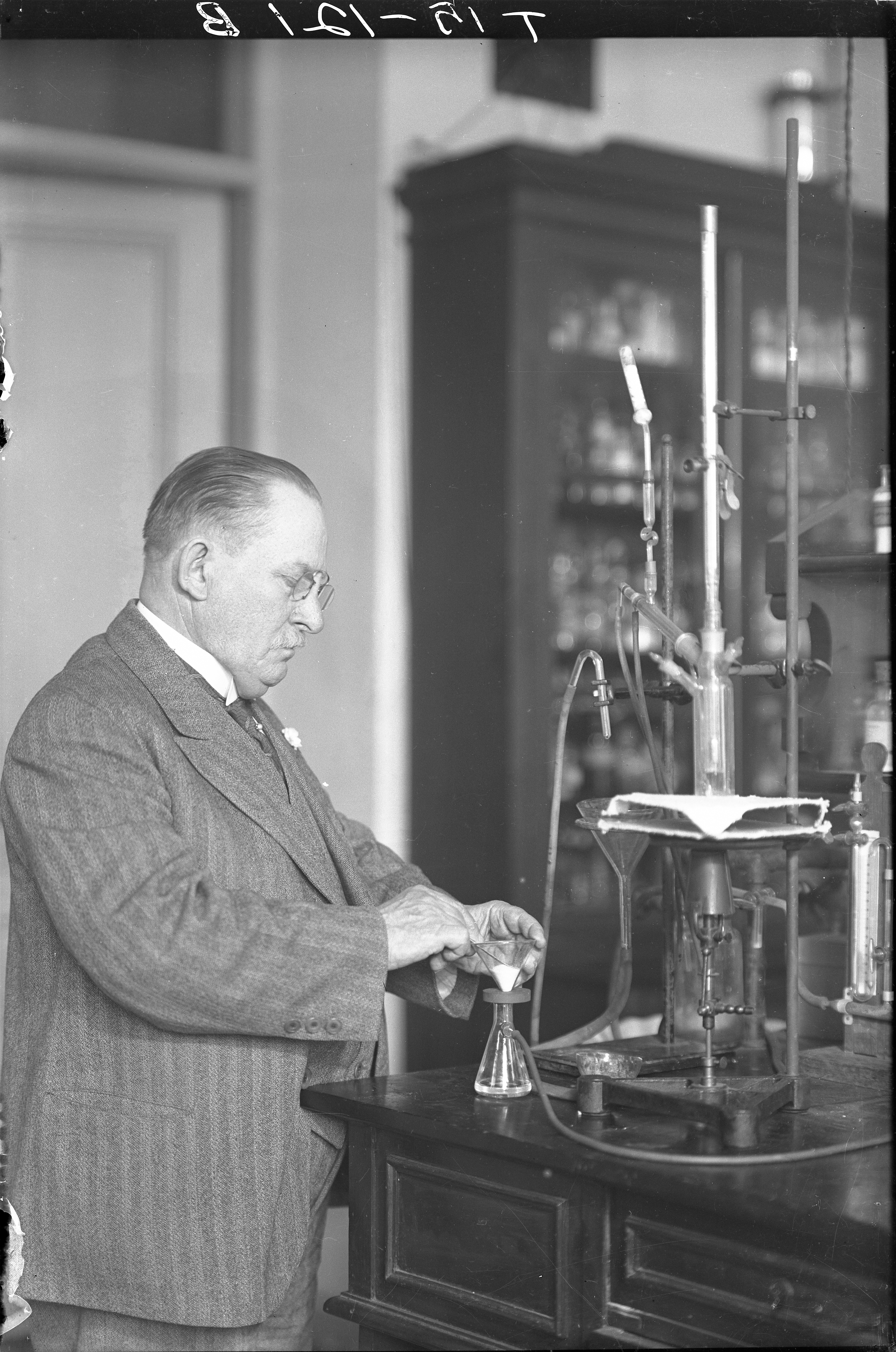 Gustaf Komppa hoiti kemian professuuria (orgaaninen /epäorgaaninen kemia) vuoteen 1937. Lempinimi "Mestari" annettiin hänen taidostaan onnistua epätoivoisen tuntuisissa orgaanisissa synteeseissä. Kompan laboratorio tuhoutui käytännössä täysin talvisodan alkupommituksissa kaksi vuotta Kompan siirryttyä eläkkeelle. TKKKA288 Aalto-yliopisto / Aalto University Tiedätkö lisää tästä kuvasta? Jätä kommentti tai ota yhteyttä sähköpostitse: Lisätietoja kuvakokoelmista / more information